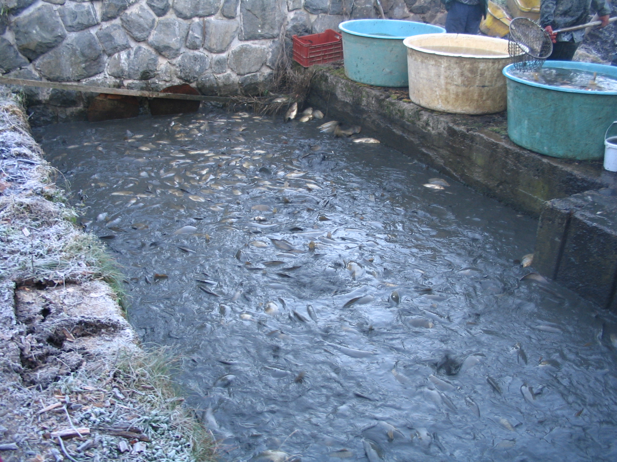 Loviště pod hrází